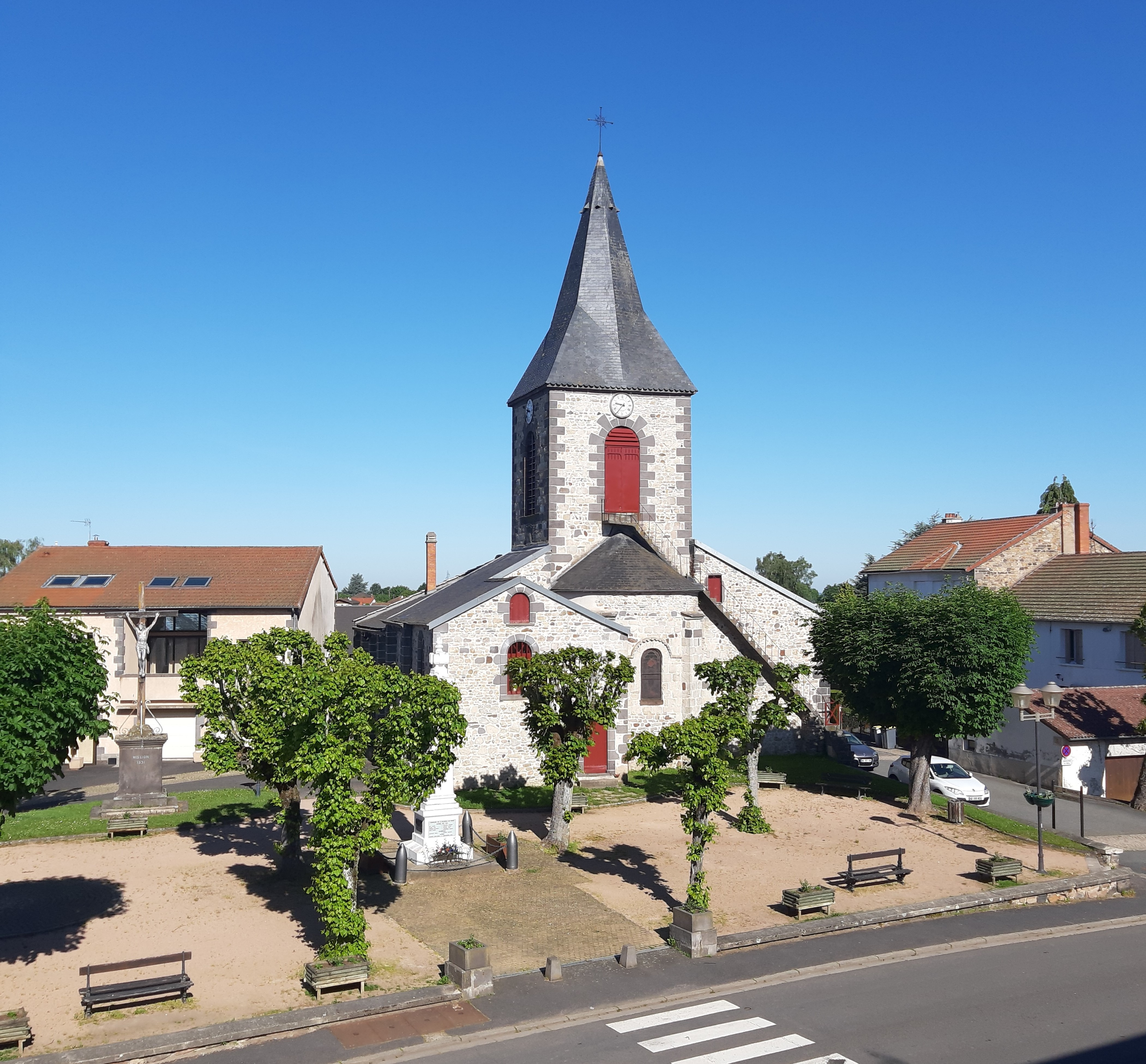 Place de l'Eglise.